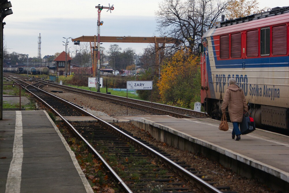 Przyjazd do Żar